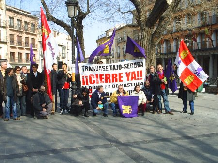 Homenaje a los Comuneros en Toledo 2006 de Tierra Comunera.